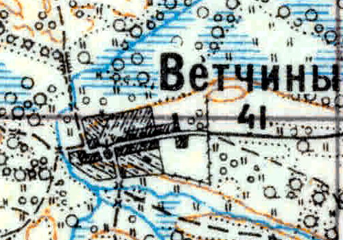 Топографическая карта Ленинградской области, квадрат VIc (Красные Горы), деревня Ветчины